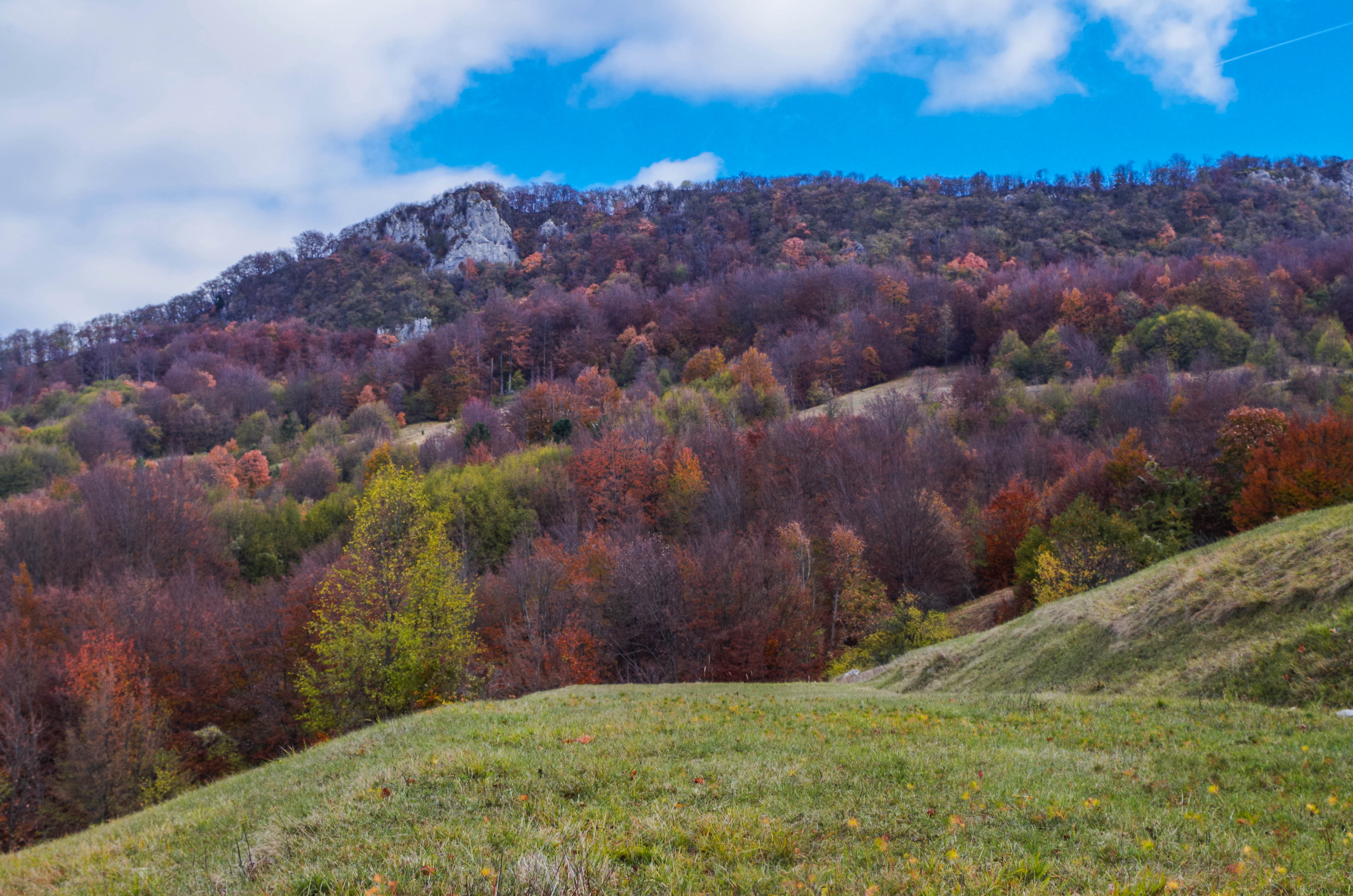 Učka pogled sa istarske strane